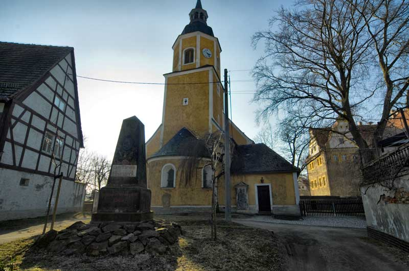 Ev.-luth. Kirche Wermsdorf mit Bismarck-Denkmal